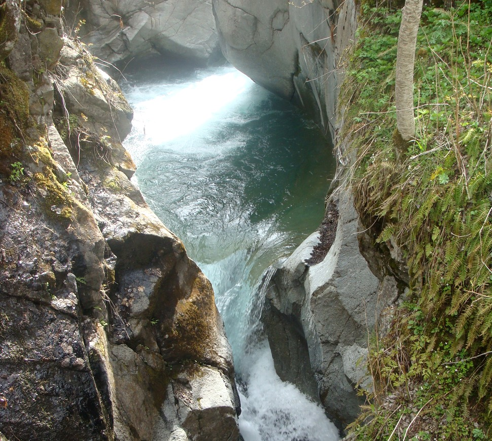 Les Oules du diable, une marmite vue de près.